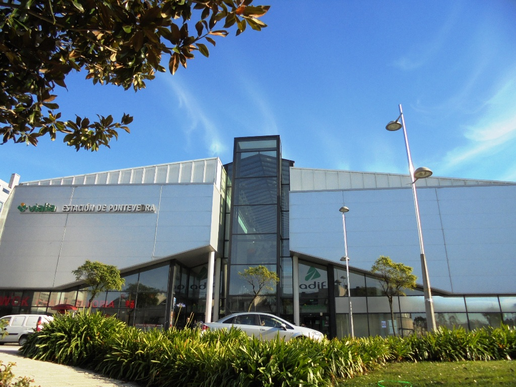 Centro Vialia en Pontevedra Capital, entrada principal